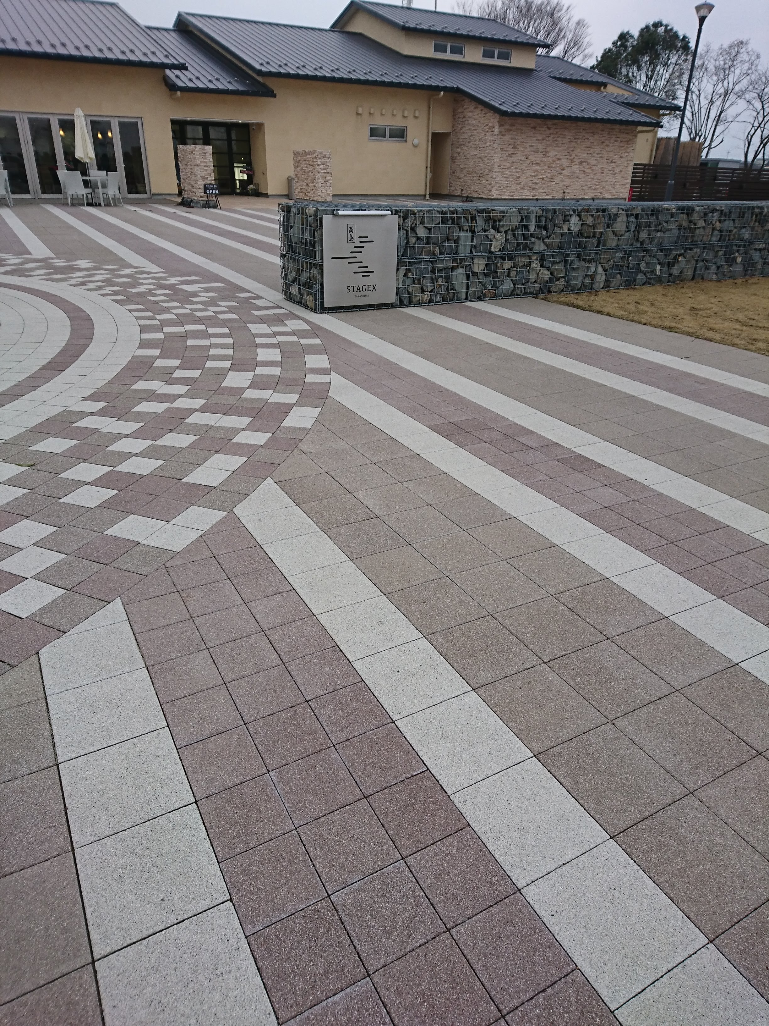 リニューアル後のしんあさひ風車村